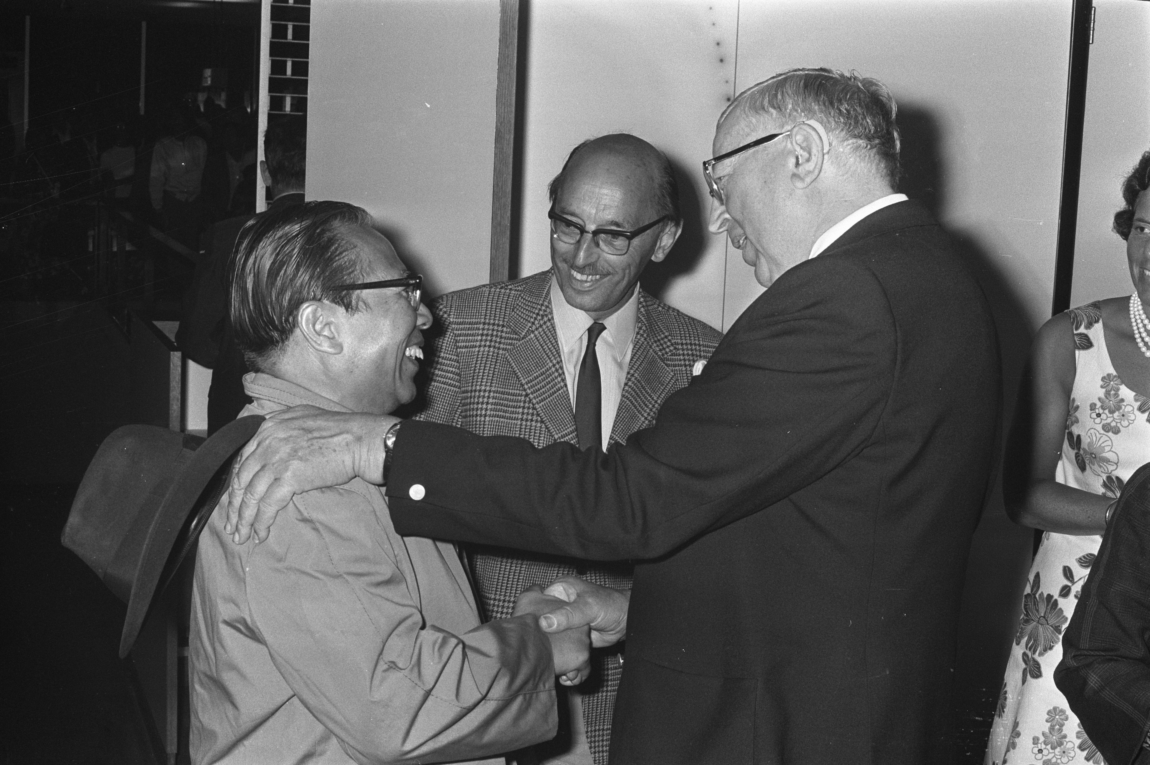 Collectie / Archief : Fotocollectie Anefo Reportage / Serie : [ onbekend ] Beschrijving : Indonesische professor mr. O. Notohamidjojo op Schiphol prof. Verkuyl (rechts) begroet prof. Notohamidjojo Datum : 30 augustus 1972 Locatie : Noord-Holland, Schiphol Trefwoorden : professoren Fotograaf : Verhoeff, Bert / Anefo Auteursrechthebbende : Nationaal Archief Materiaalsoort : Negatief (zwart/wit) Nummer archiefinventaris : bekijk toegang 2.24.01.05 Bestanddeelnummer : 925-8432